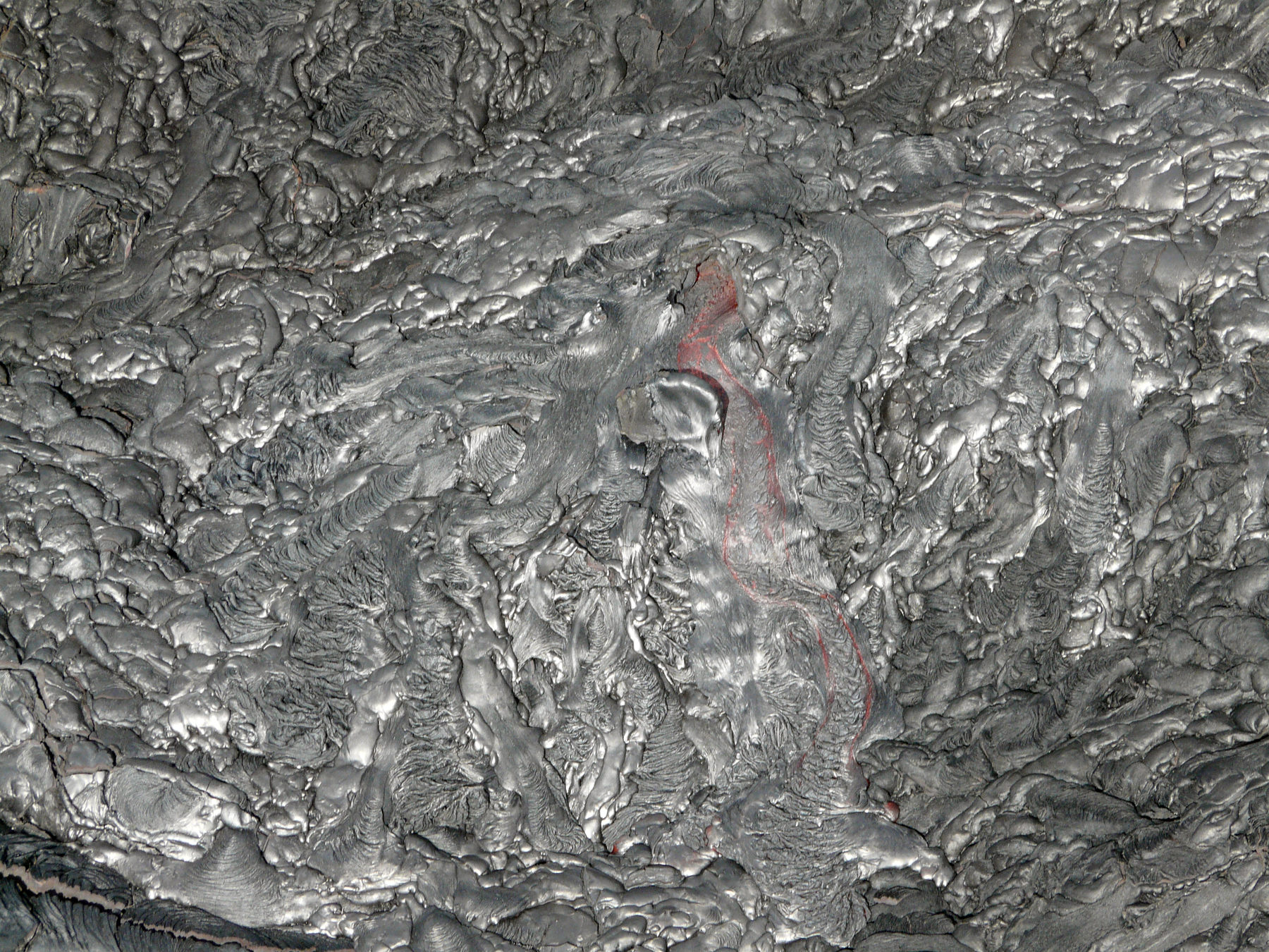 Épanchement de lave basaltique depuis un émissaire du volcan Puʻu_ʻŌʻō. Coulées de type pahoehoe